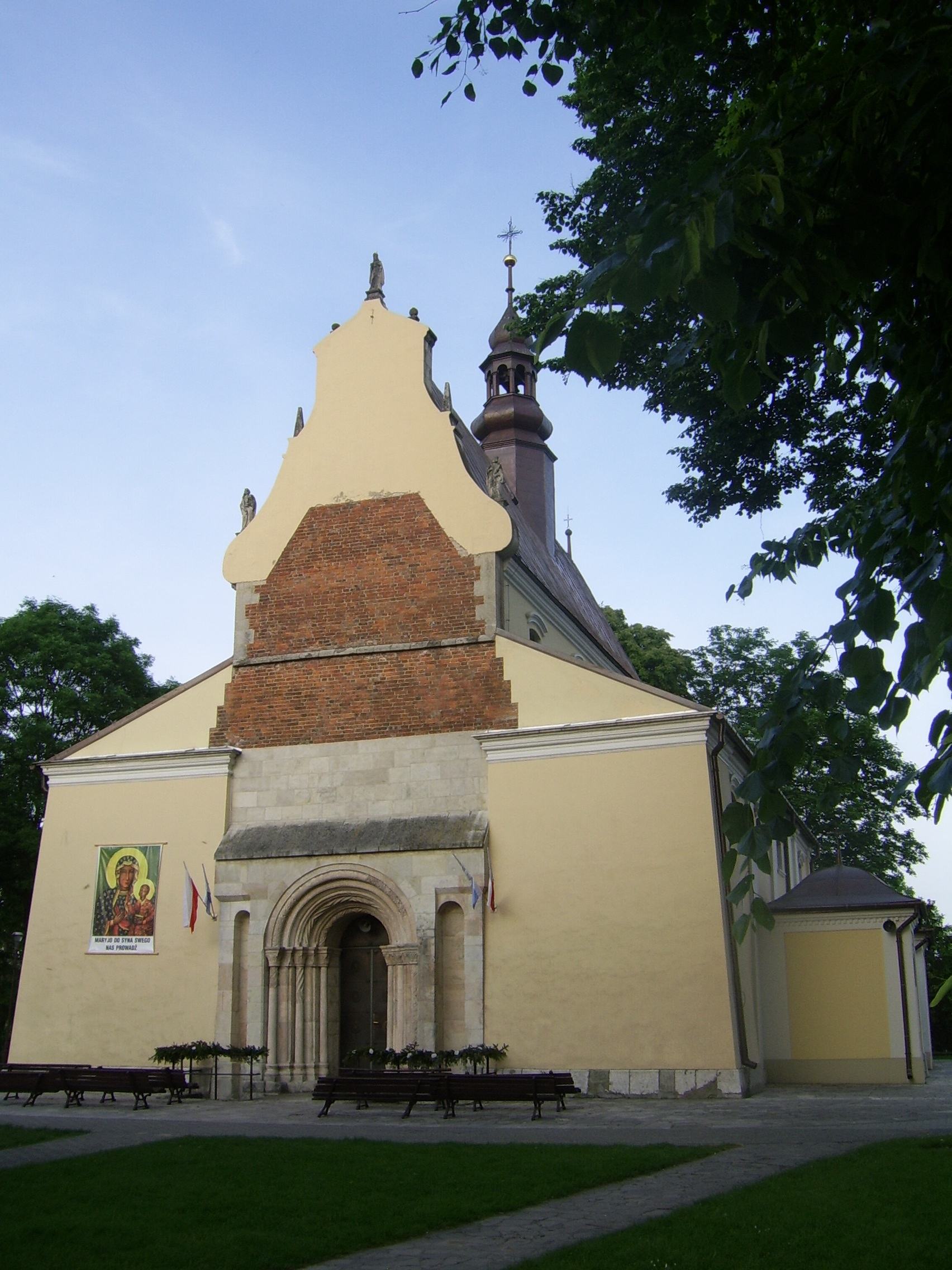 Kościelec (województwo małopolskie) - fasada kościoła.